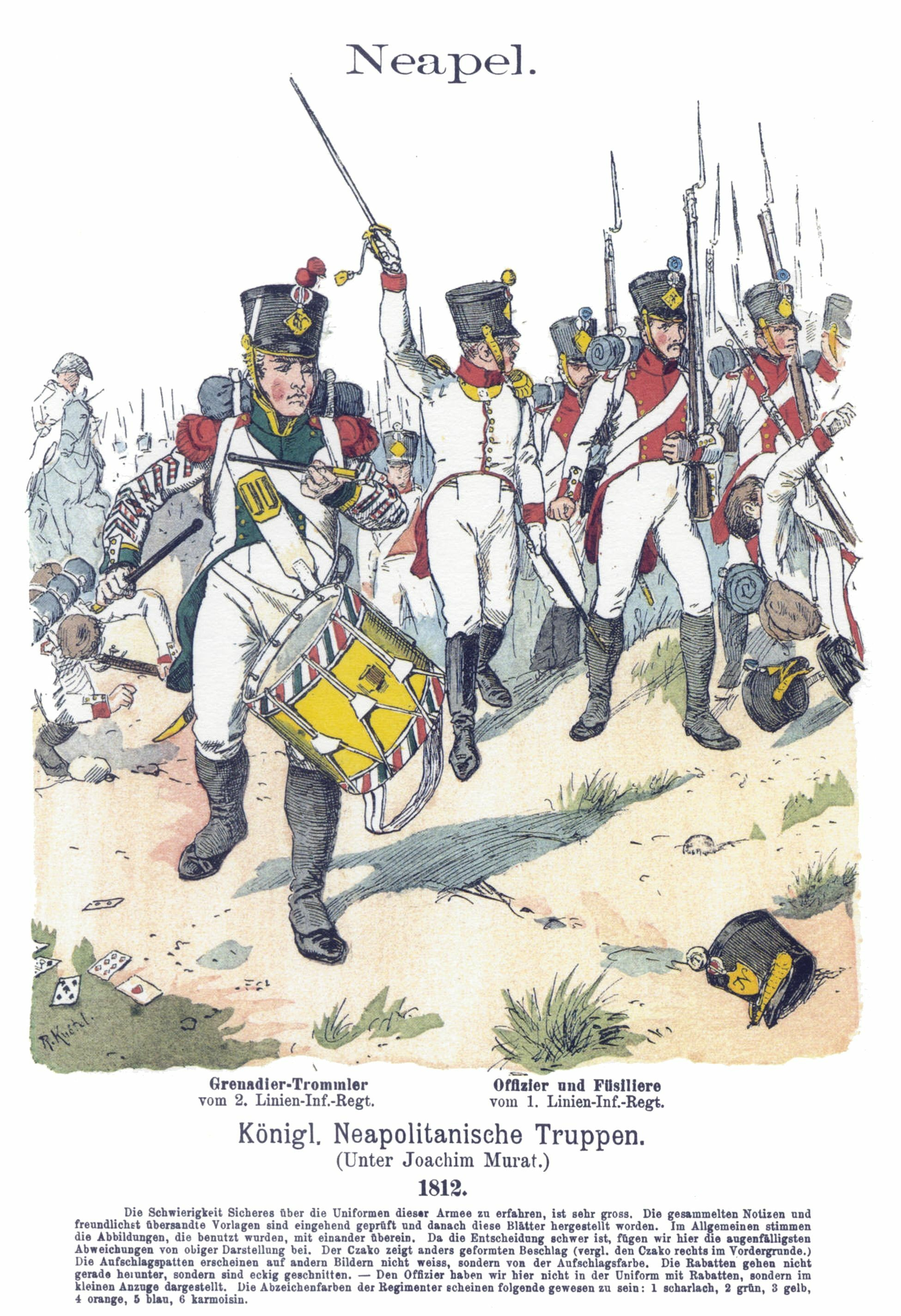 Infanterie du Royaume de Naples, 1812 : tambour du 2e de ligne (à gauche) ry et officier et soldats du 1er de ligne (au centre et à droite).